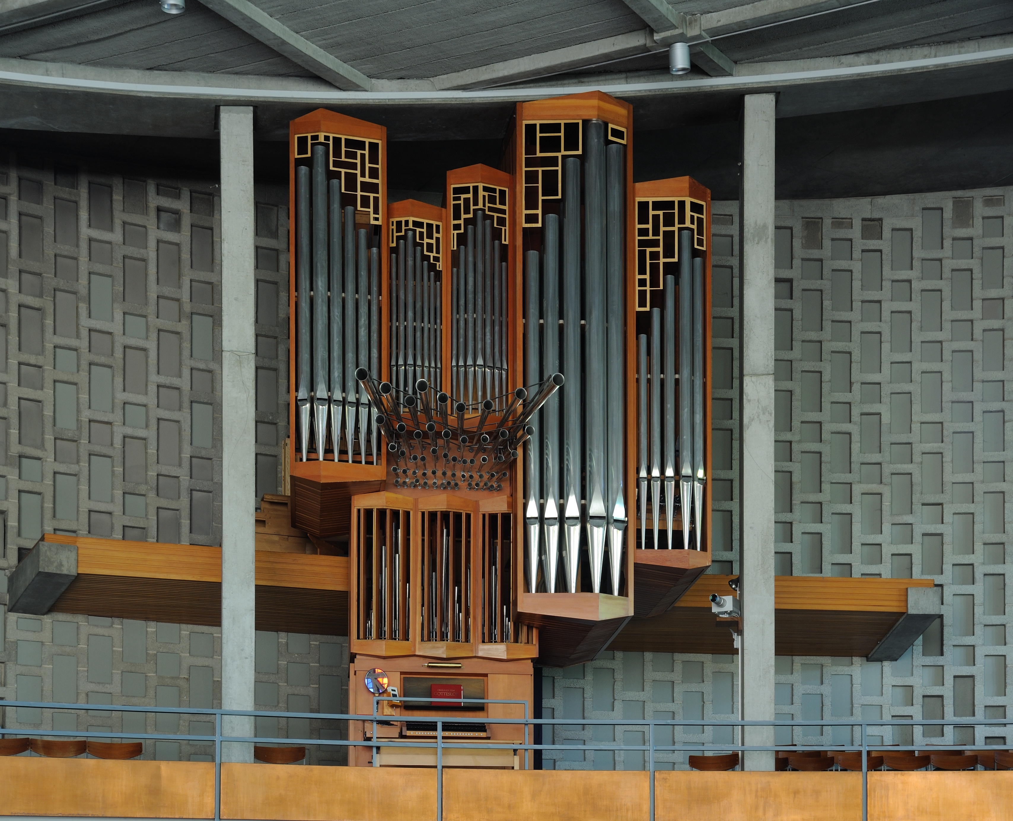 St. Peter: Orgel